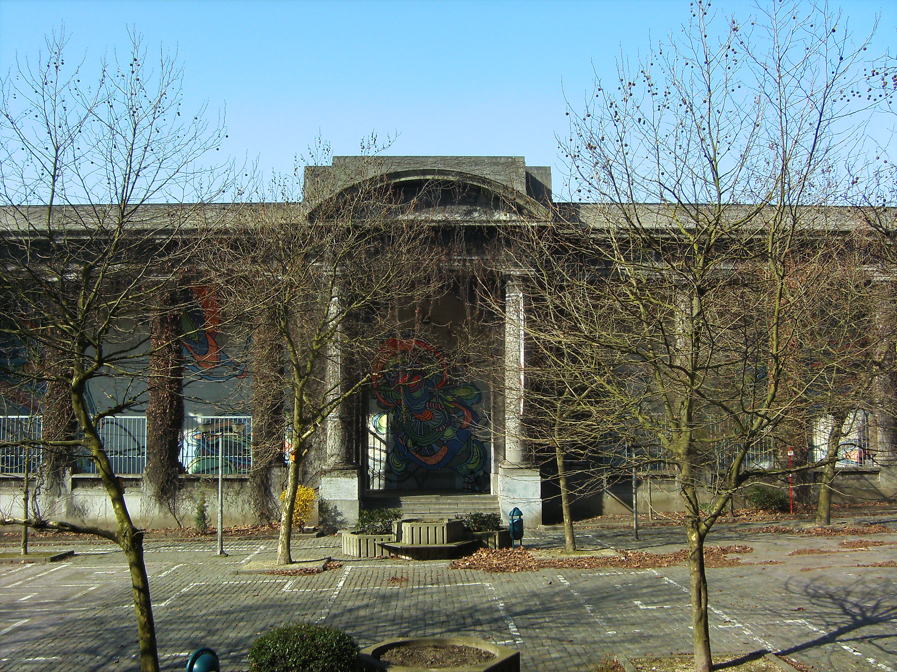 Charleroi (Belgique), dessiné par Gabriel Devreux (1886-1917) comme Palais de l'Art wallon pour l'exposition de Charleroi de 1911. Portique d'entrée. Le bâtiment hébergé actuellement le B.P.S.22 est l’espace de création contemporaine de la Province de Hainaut.